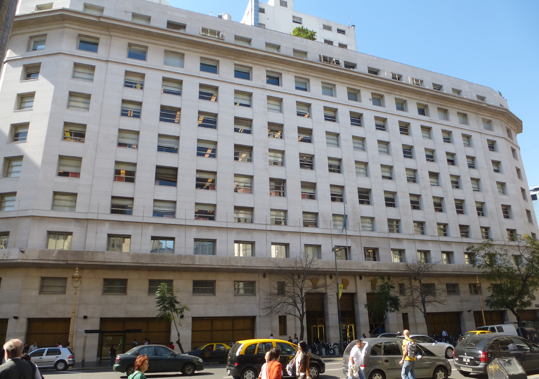 Yacimientos Petrolíferos Fiscales (YPF)